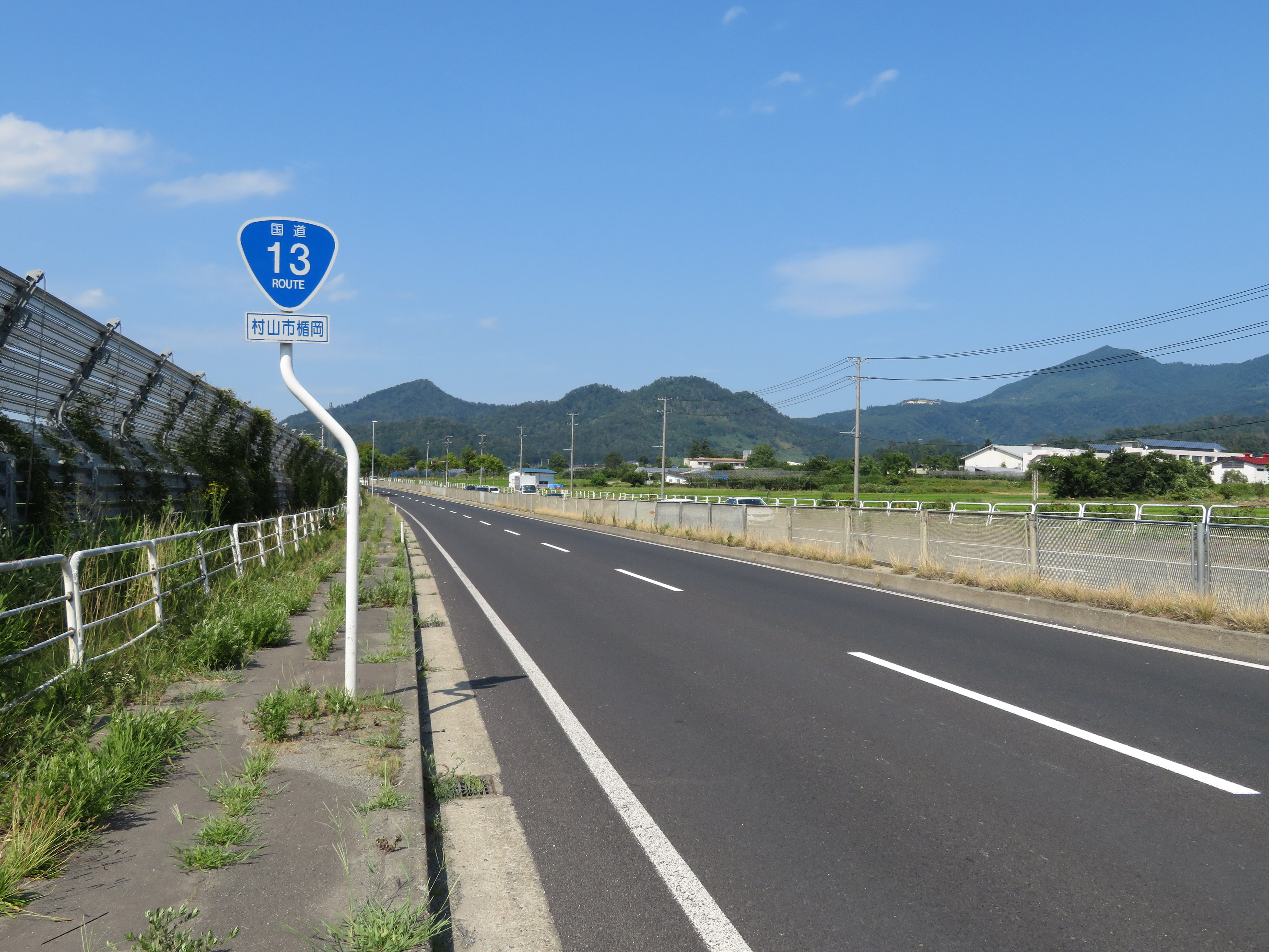 国道13号線山形北バイパス山形県村山市楯岡付近（新庄方面を撮影） Canon PowerShot SX720 HS